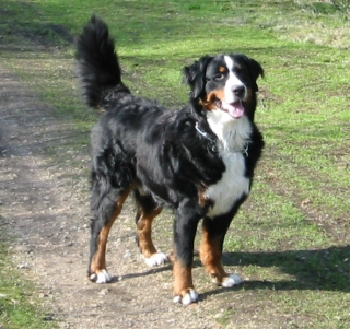 Bernese Mountain Dog